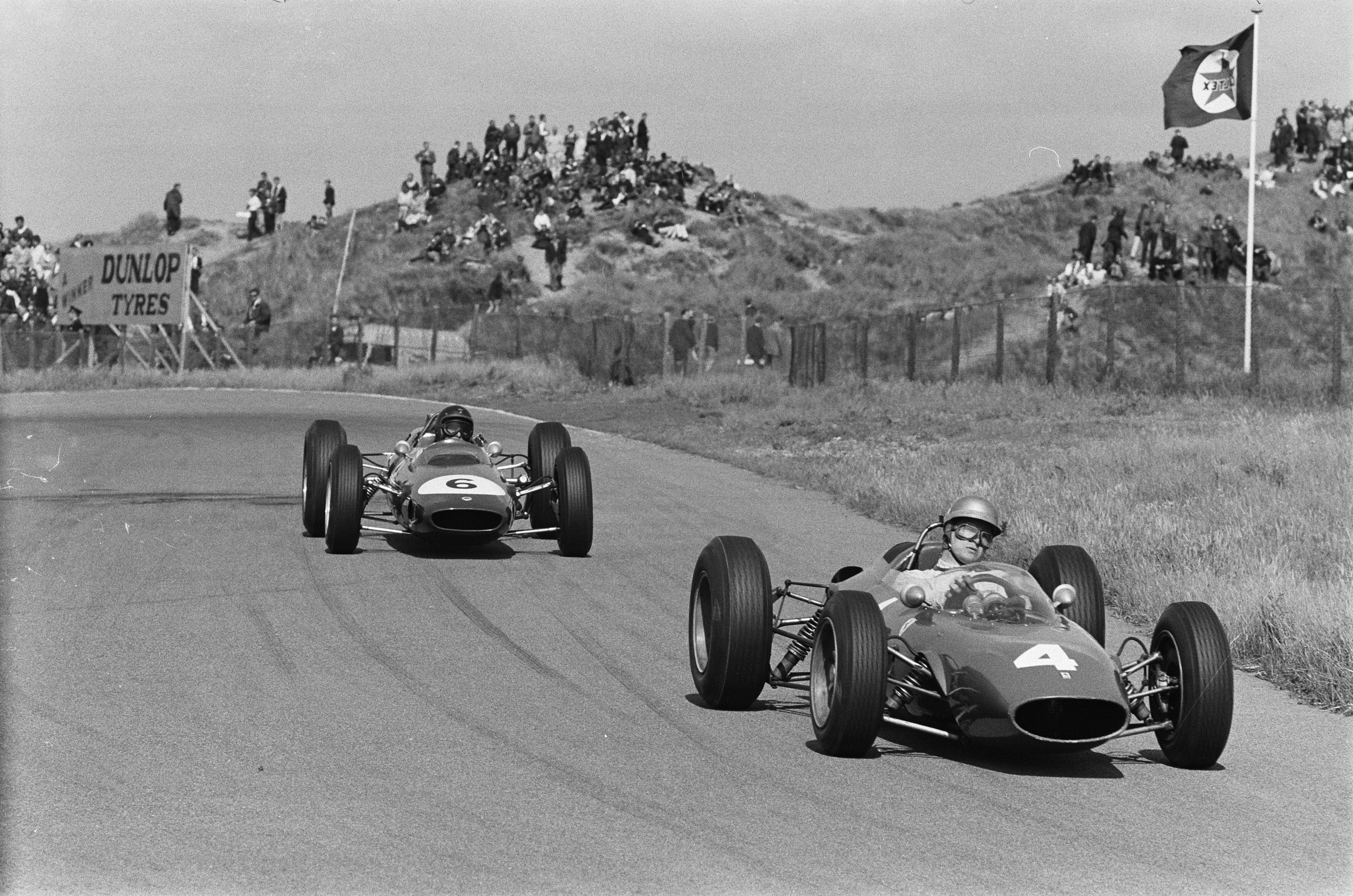 Collectie / Archief : Fotocollectie Anefo Reportage / Serie : [ onbekend ] Beschrijving : Grand Prix te Zandvoort. Nummer 24 Phil Hill , nummer 25 Scarfrotti Datum : 23 juni 1963 Locatie : Noord-Holland, Zandvoort Fotograaf : Pot, Harry / Anefo Auteursrechthebbende : Nationaal Archief Materiaalsoort : Negatief (zwart/wit) Nummer archiefinventaris : bekijk toegang 2.24.01.05 Bestanddeelnummer : 915-2881